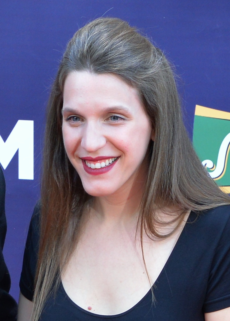 Португальська співачка Луїза Собрал на церемонії відкриття пісенного конкурсу Євробачення 2017 у Києві